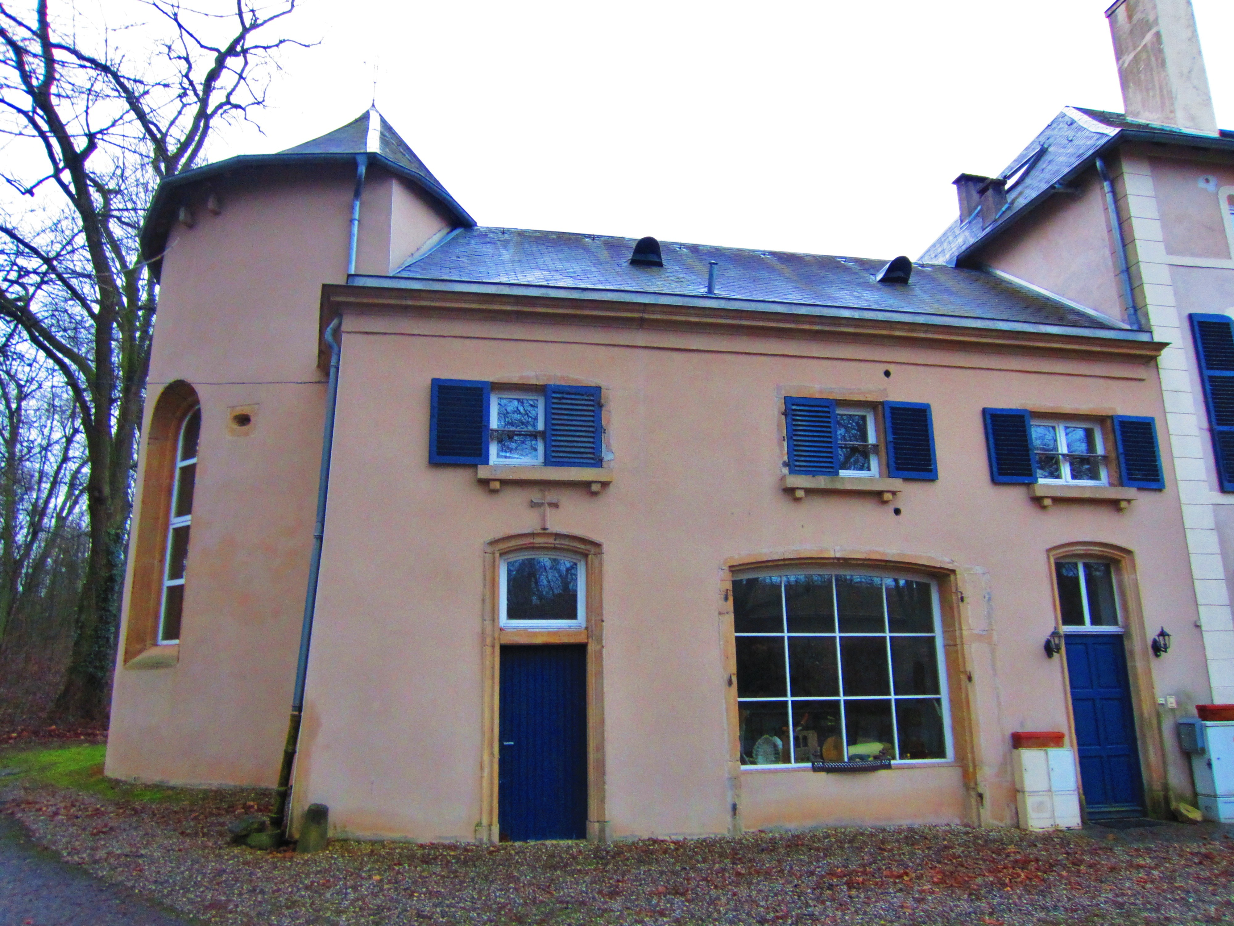 Chapelle castrale Montoy Flanvill